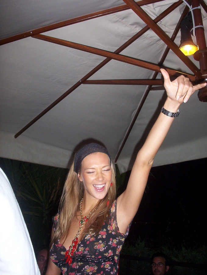 Ludmilla Radchenko - Milazzo(ME)